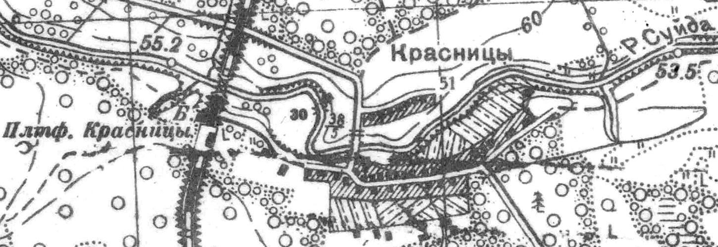 Топографическая карта Ленинградской области, квадрат О-36-13-Г-а, деревня Красницы